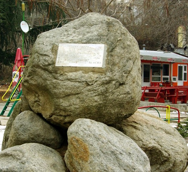 Паметна плоча на посрещането на 12 февруари 1878 г. на руските войски в Горна Джумая под командването на майор Иван Павлович Орлински командир на 4-ти Мариуполски полк,.